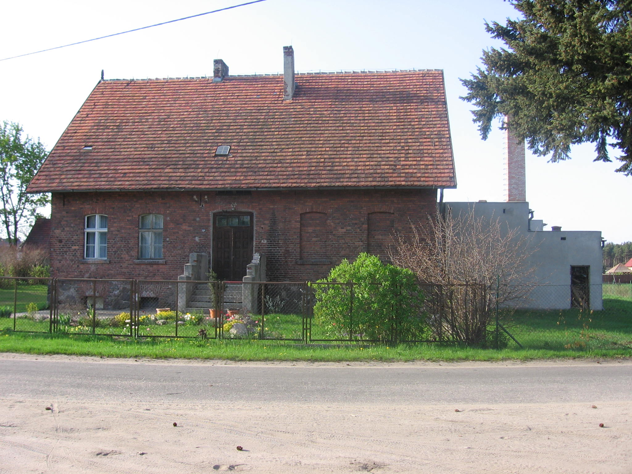 Bronków - budynek byłej szkoły.